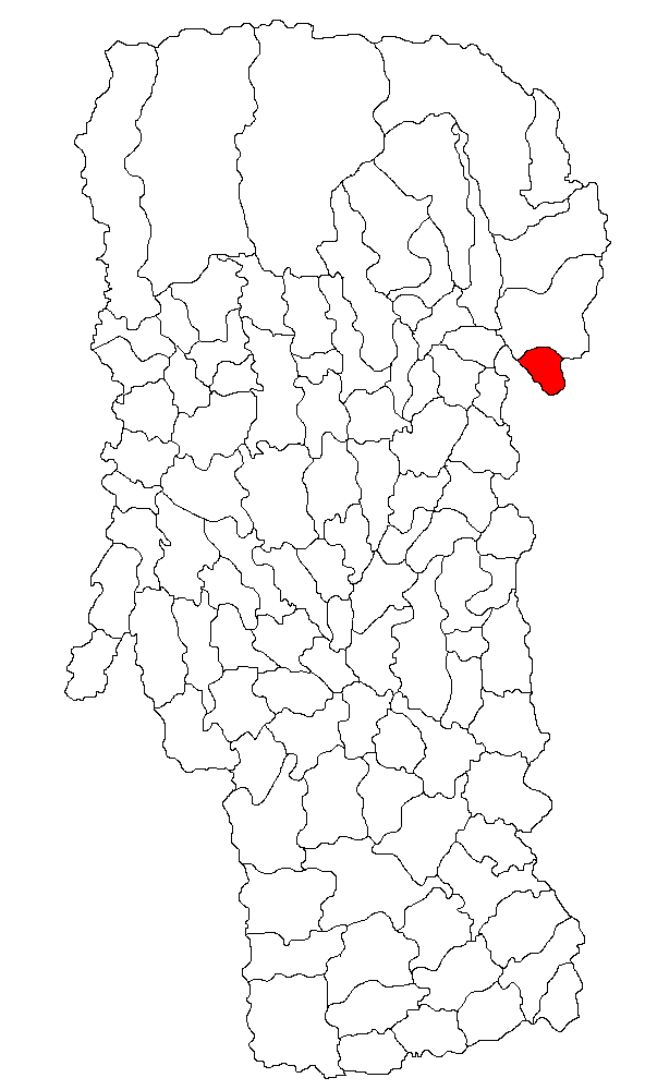 Categorie:Hărţi ale judeţului Argeş